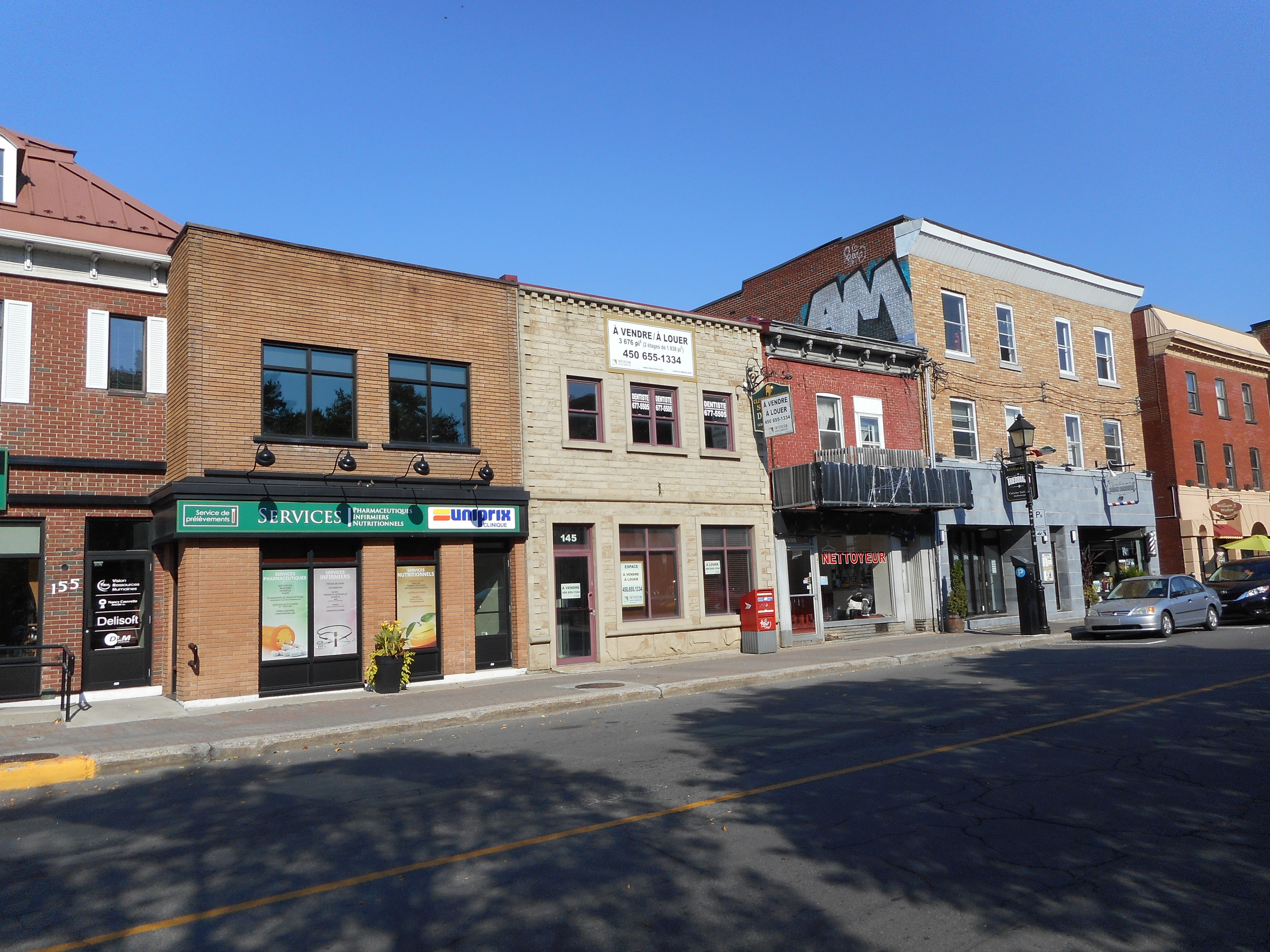 Édifices de la rue Saint-Charles, à Longueuil 155, rue Saint-Charles Ouest 147-151, rue Saint-Charles Ouest 145, rue Saint-Charles Ouest 141-143, rue Saint-Charles Ouest 131-137, rue Saint-Charles Ouest 121-123, rue Saint-Charles Ouest